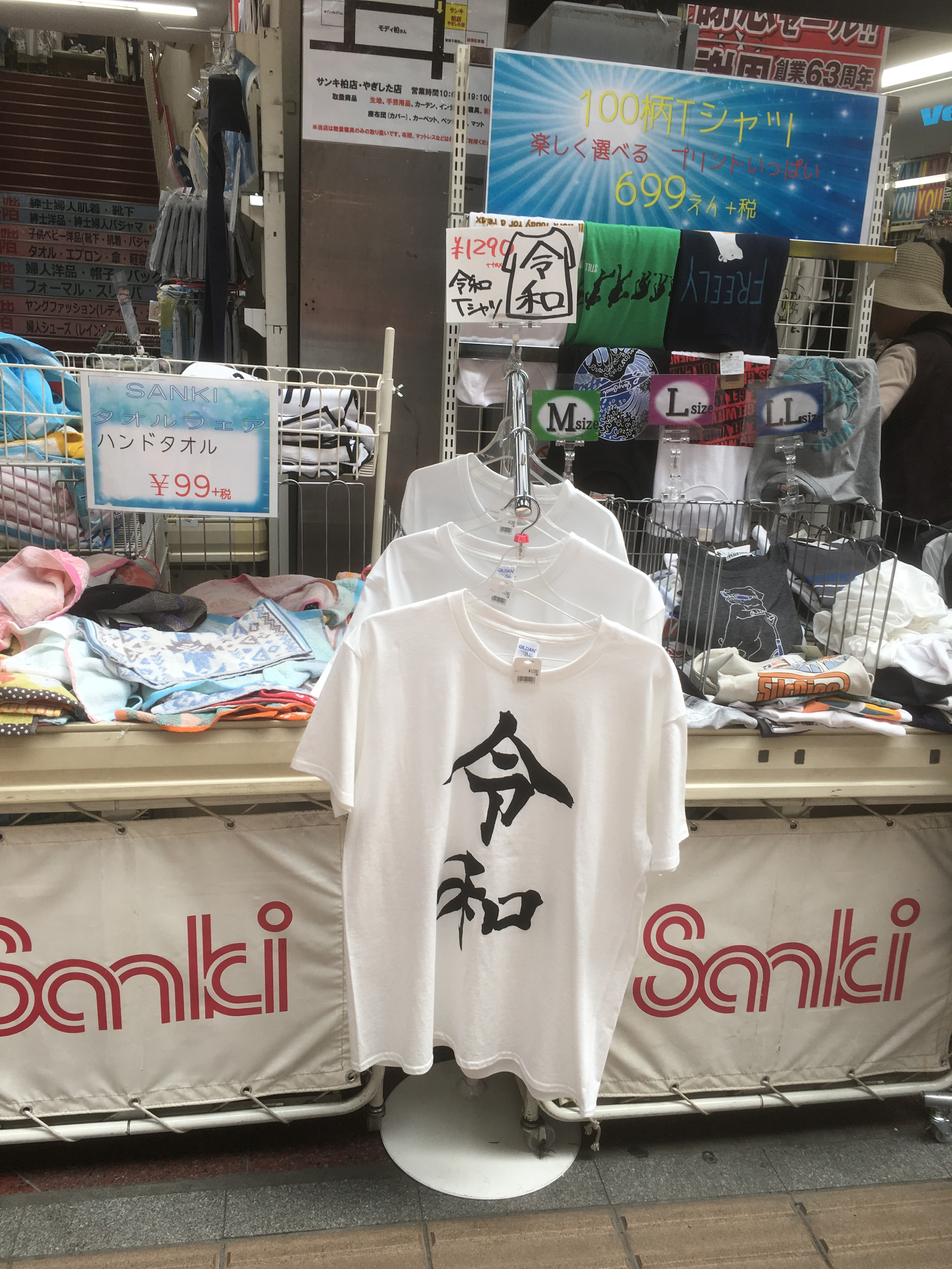 令和 (reiwa)